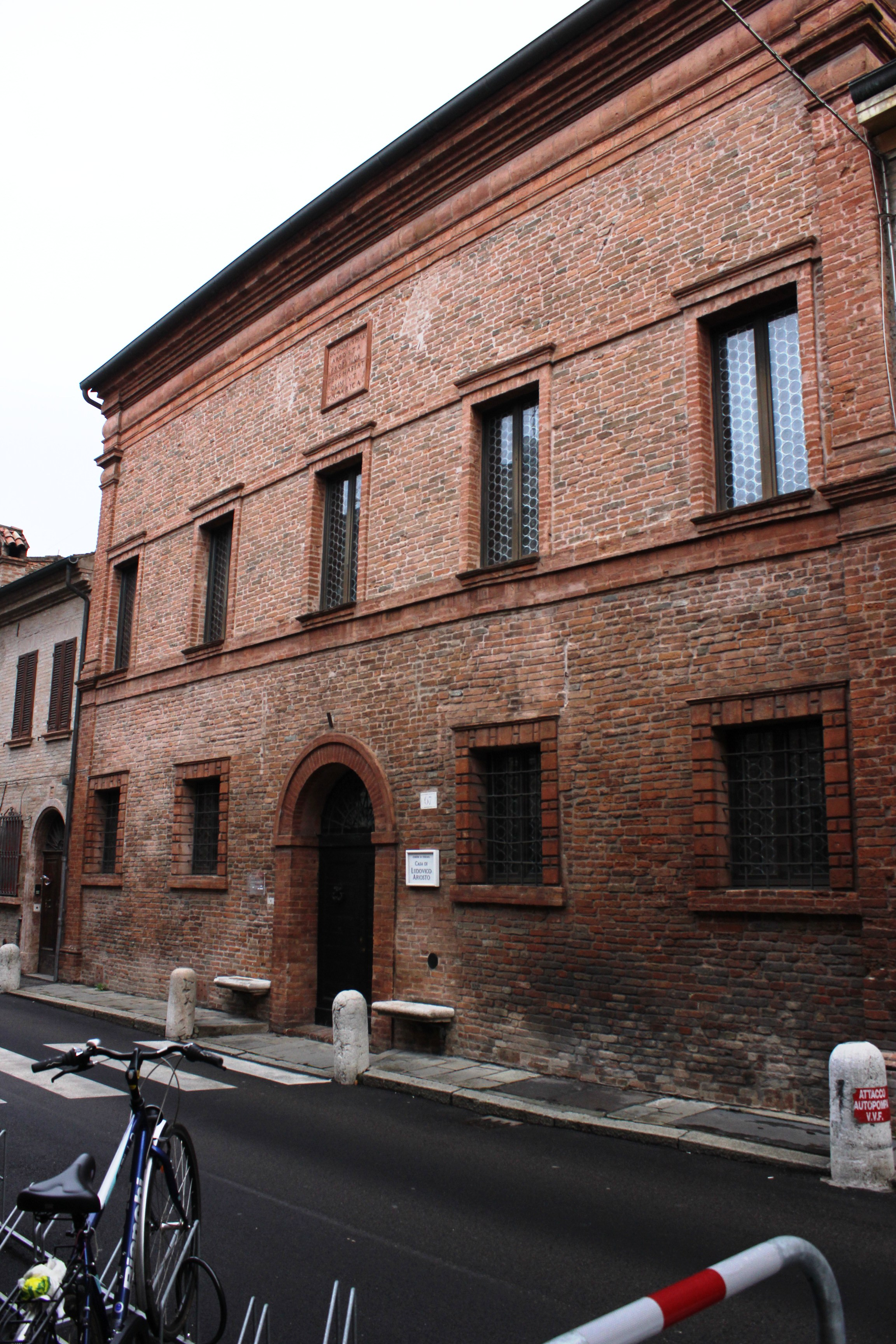 Къщата на Лудовико Ариосто във Ферара.